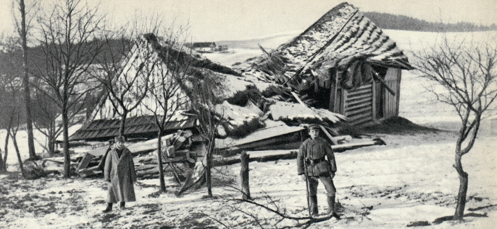 Zwalona chałupa po wybuchu granatu pod Limanową.